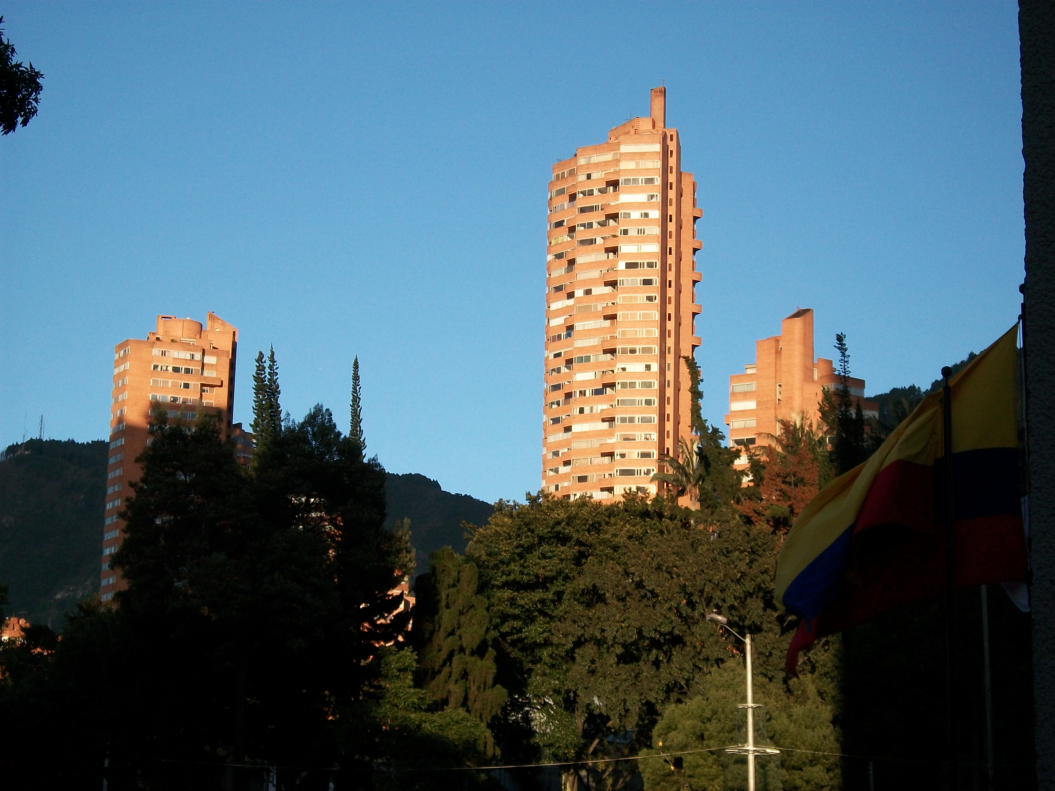 El Conjunto Residencial "Torres del Parque" desde la Carrera Séptima con Calle Veintiséis, al pie de la Torre Colpatria